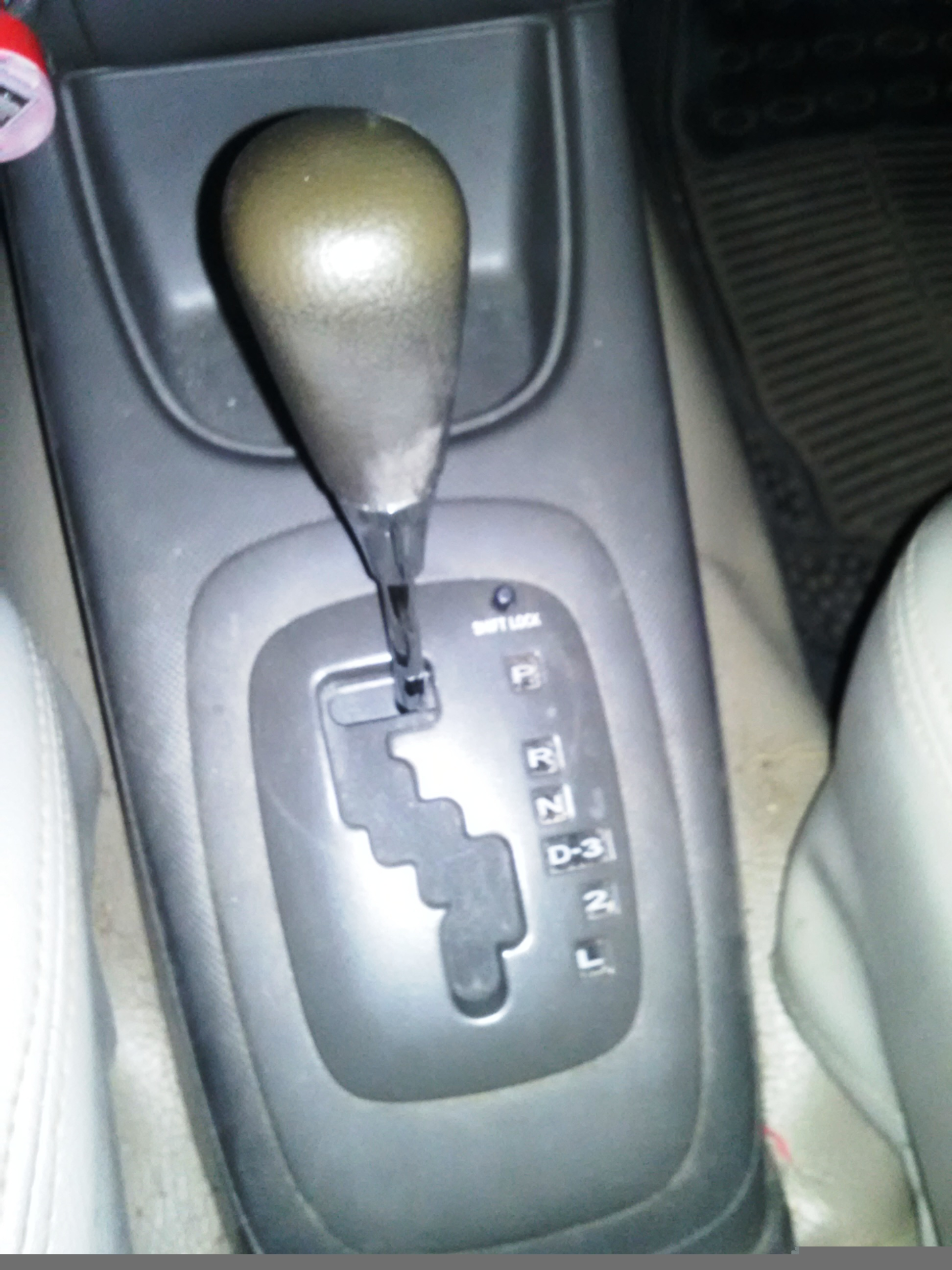 Tuas transmisi otomatis pada mobil Toyota Avanza